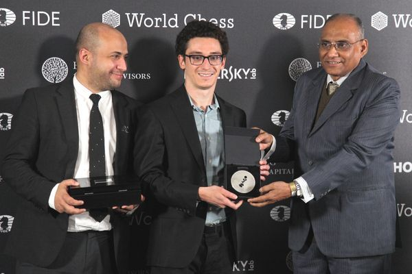 Награждение Фабиано Каруана, Турнир Претендентов 2018